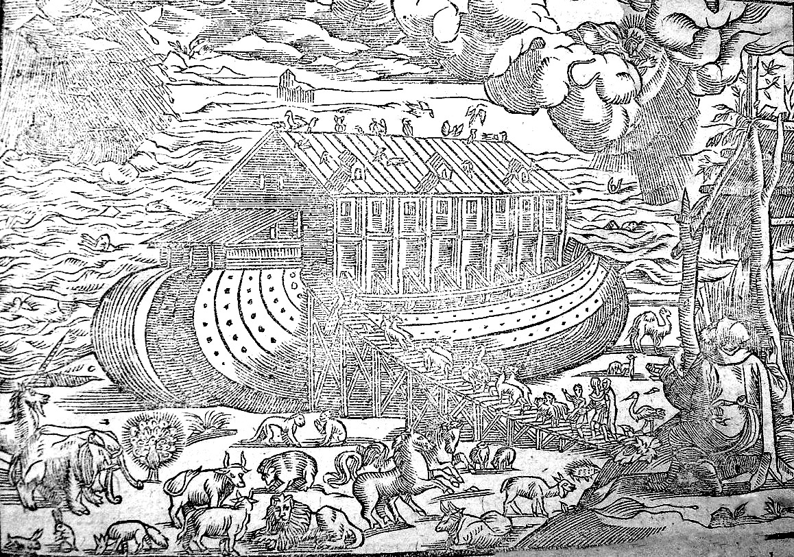 Bible Déluge Arche de Noé Licorne